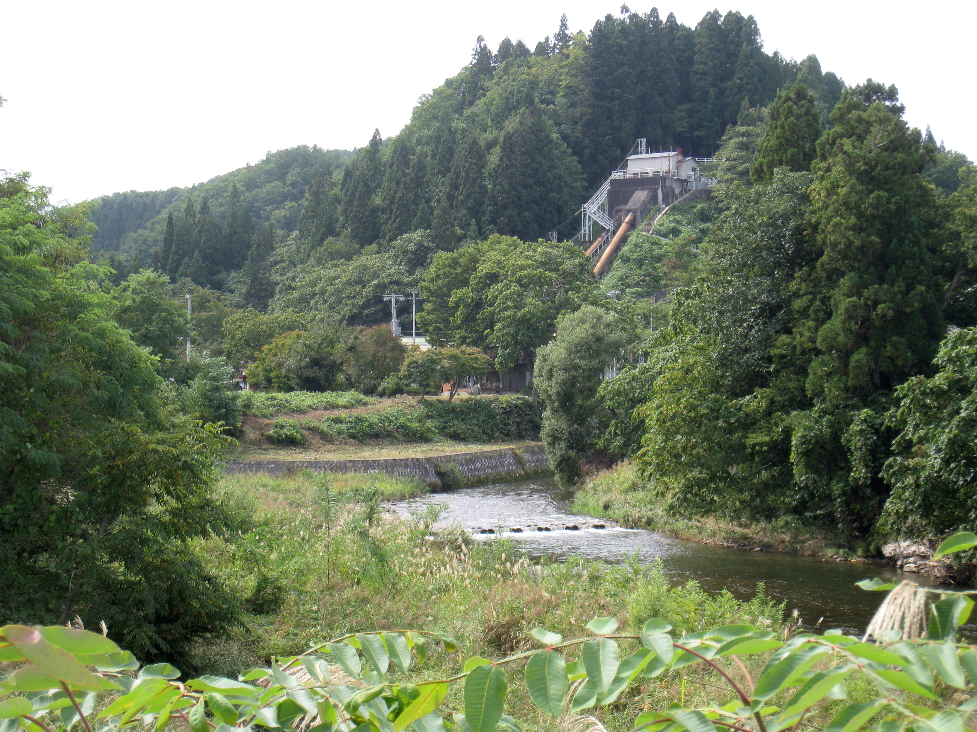 館山城（山形県米沢市）跡地、館山水力発電所